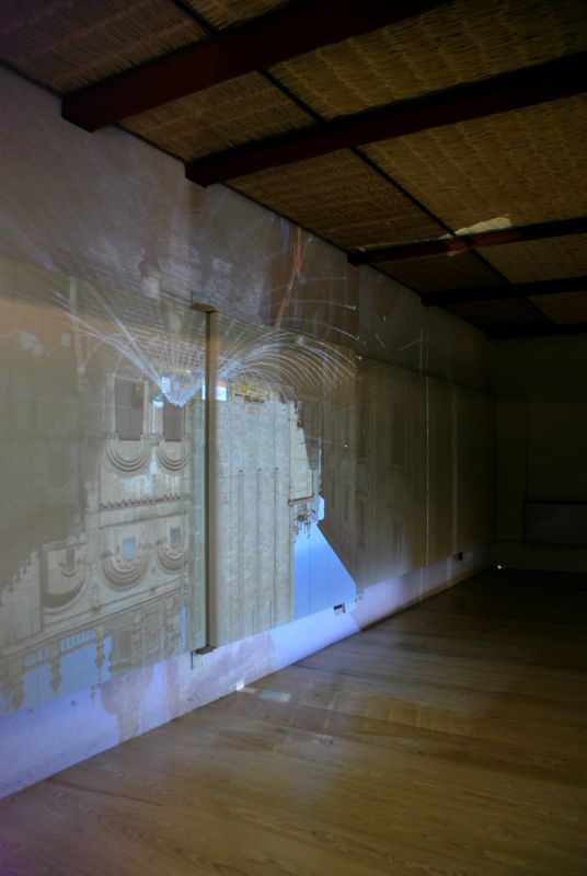 Proyección de la Plaza de Platerías en el interior de la Casa del Cabildo que se comporta como una cámara oscura.